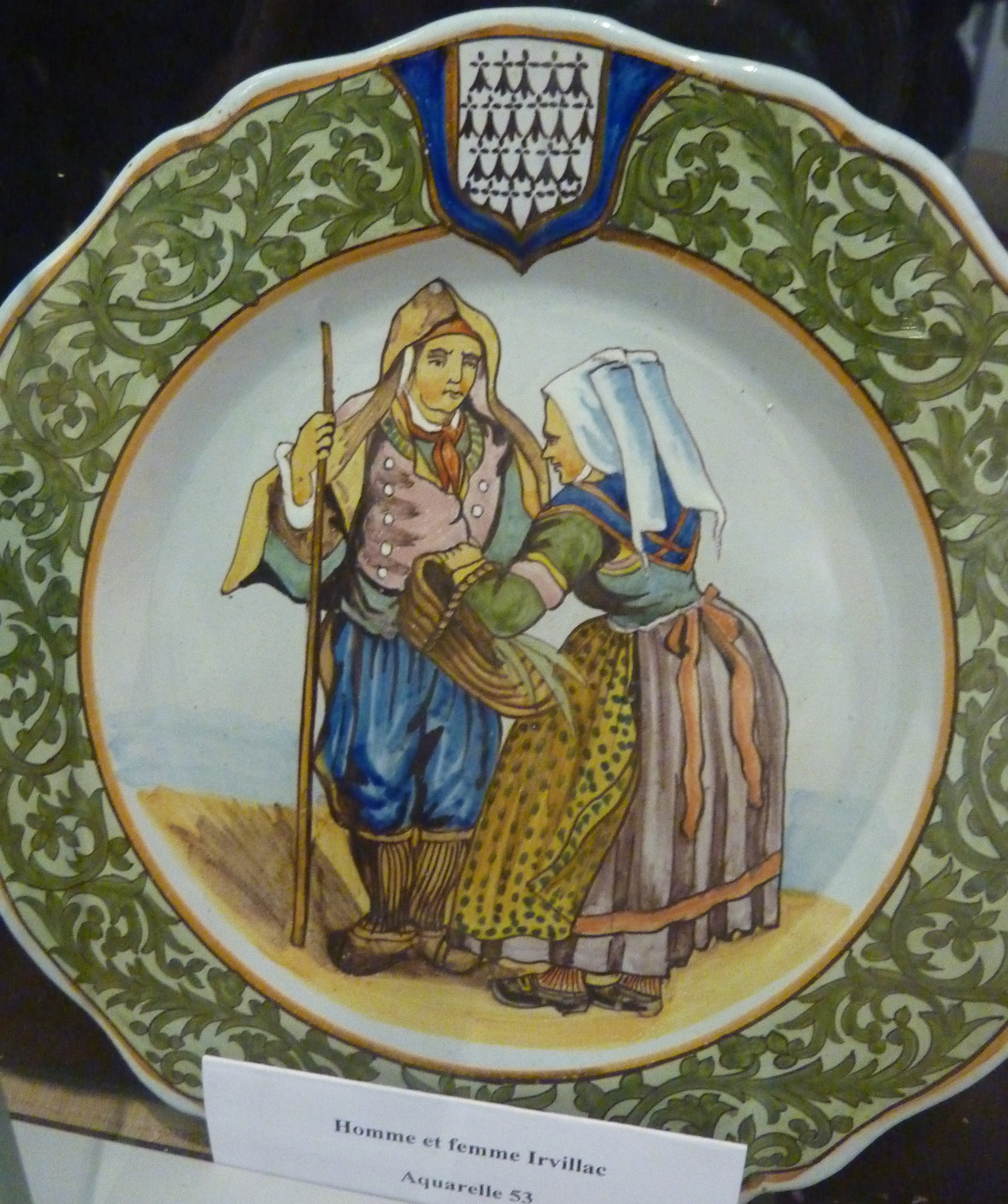 Faïence de Quimper : Homme et femme d'Irvillac (avant 1930, musée de Locronan)